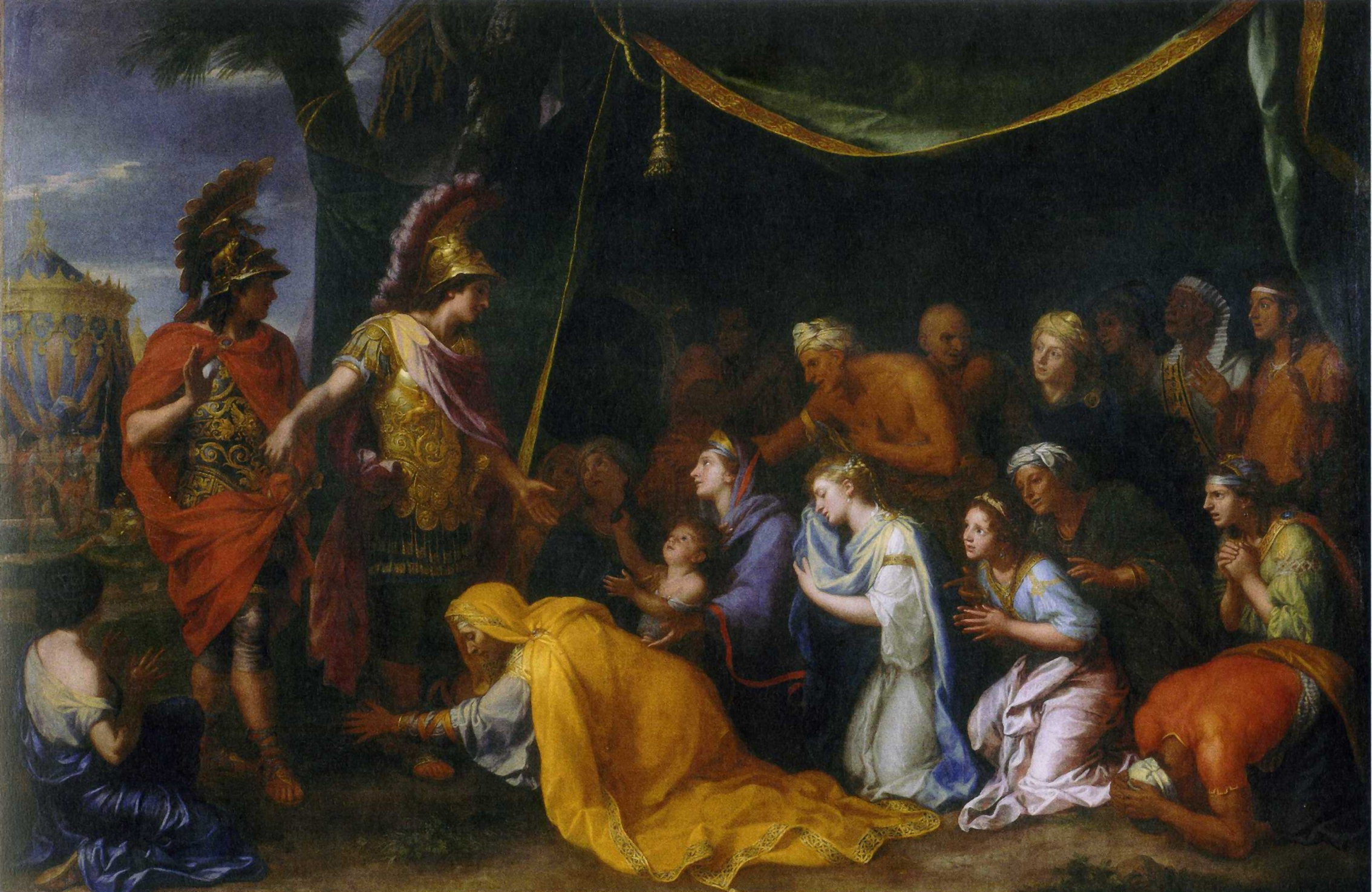 Die Familie des Perserkönigs Darius nach der Schlacht bei Issos im Zelt Alexanders des Großen. Öl auf Leinwand. Chateau de Versailles, NV 6165